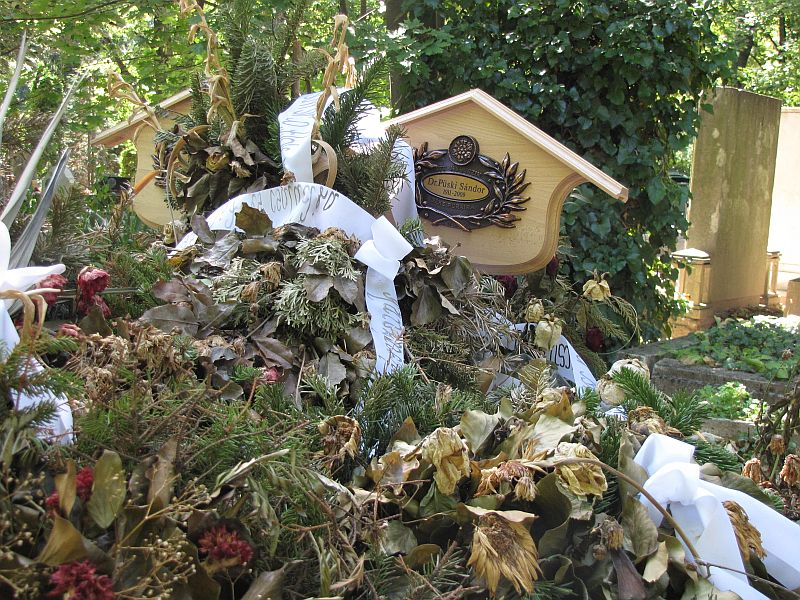 Püski Sándor (Békés, 1911. február 4. – Budapest, 2009. augusztus 2.) magyar könyvkiadó sírja Budapesten. Farkasréti temető: 6/7-1-80.